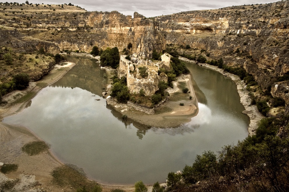 Imagen del Convento de la Hoz y sus alrededores